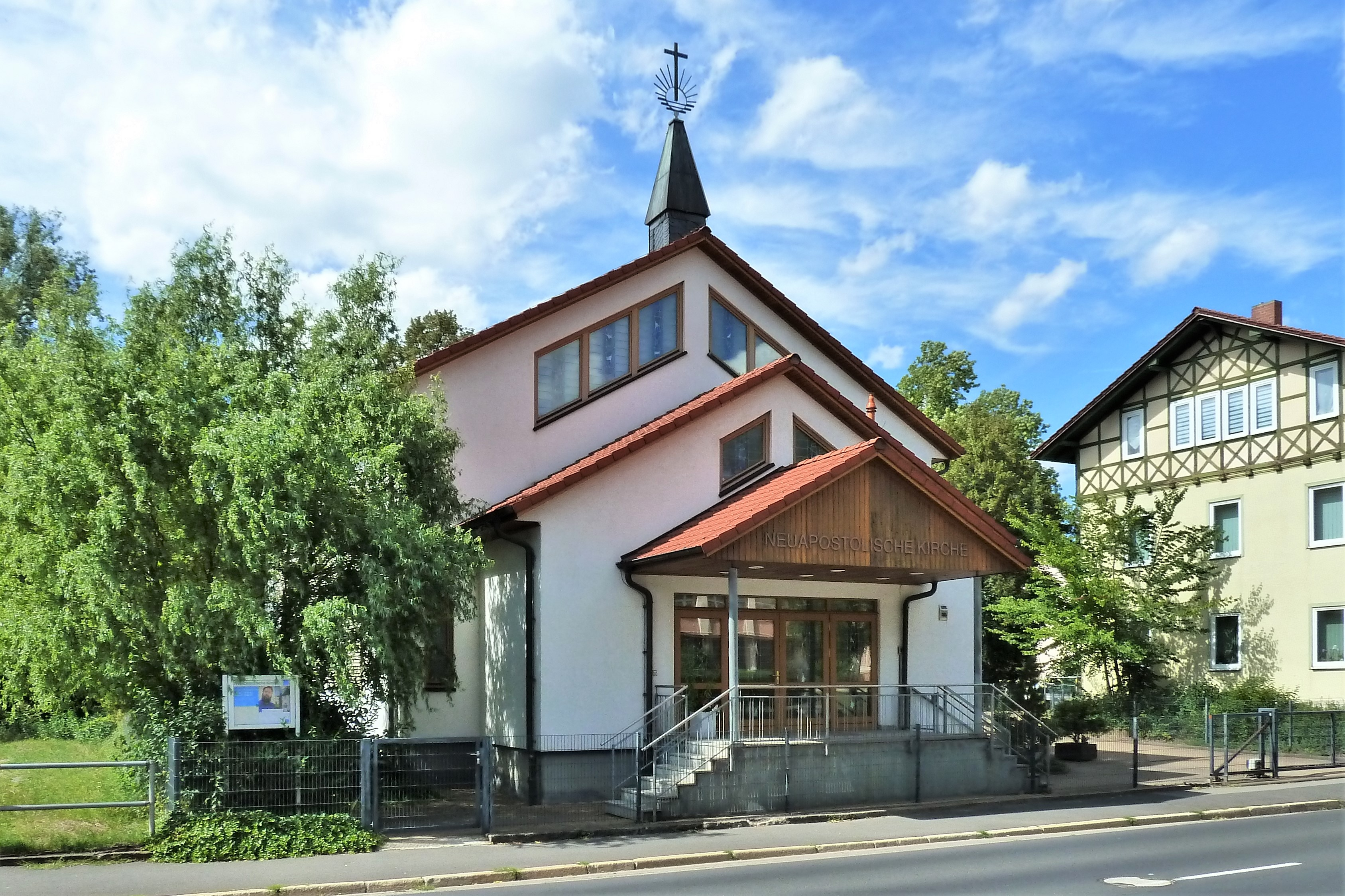 Neuapostolische Kirche in Meiningen, erbaut 2000